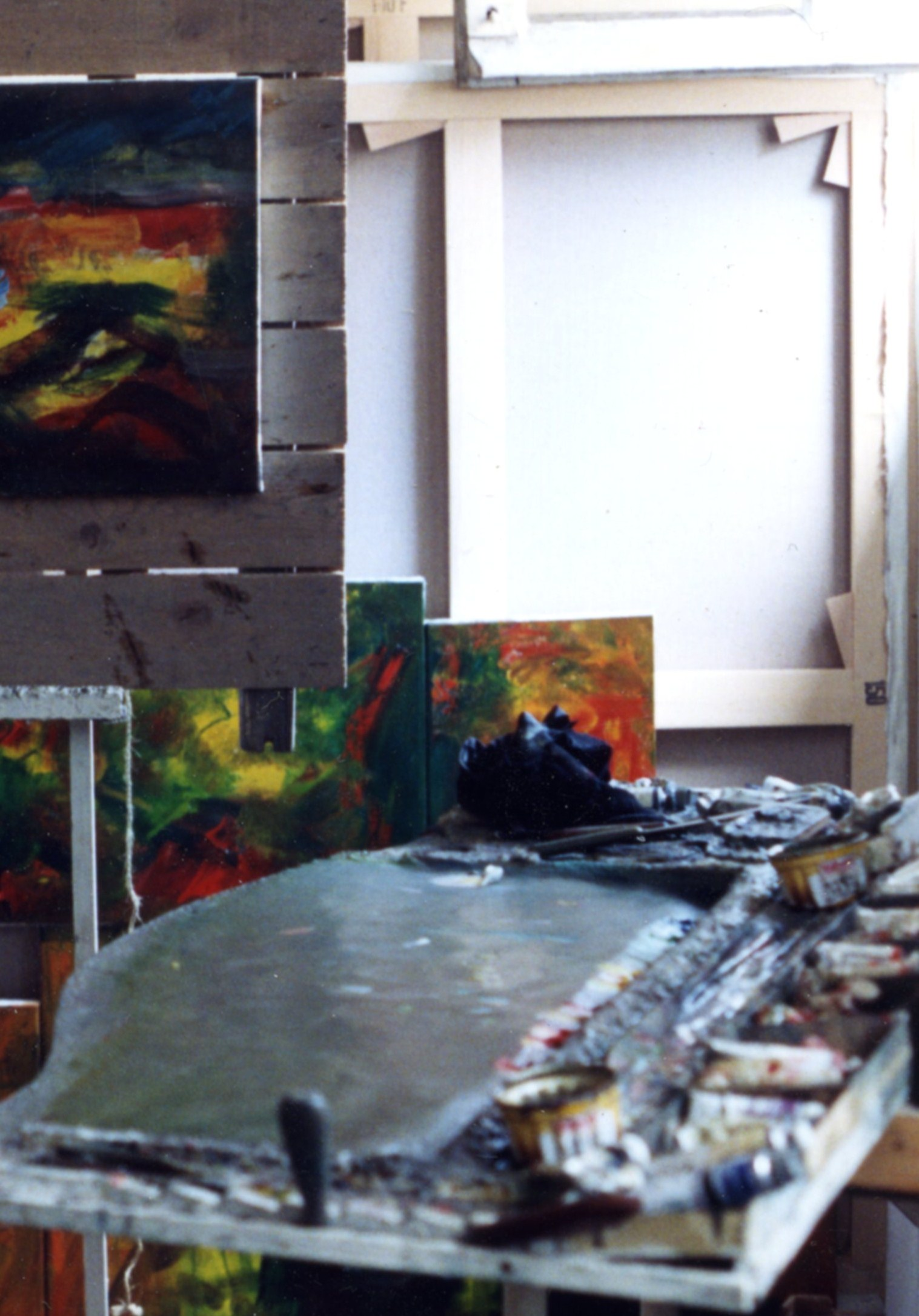 Rare photographie de l'atelier du peintre algérien Abdallah Benanteur